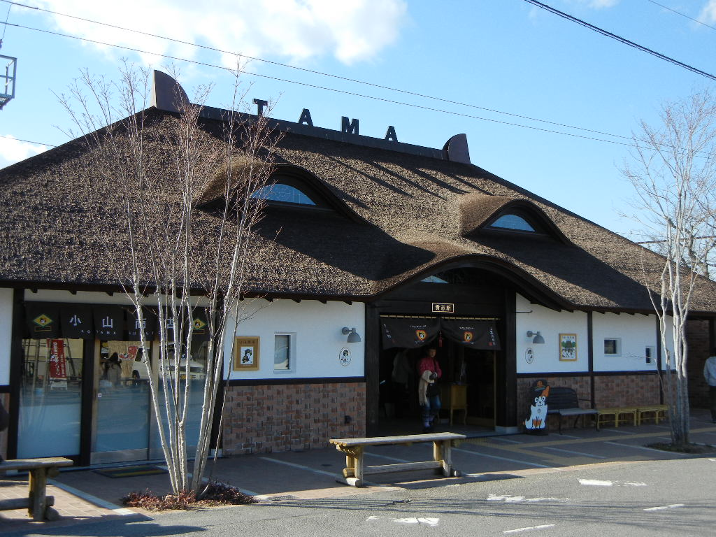 Kishi Station, Kinokawa